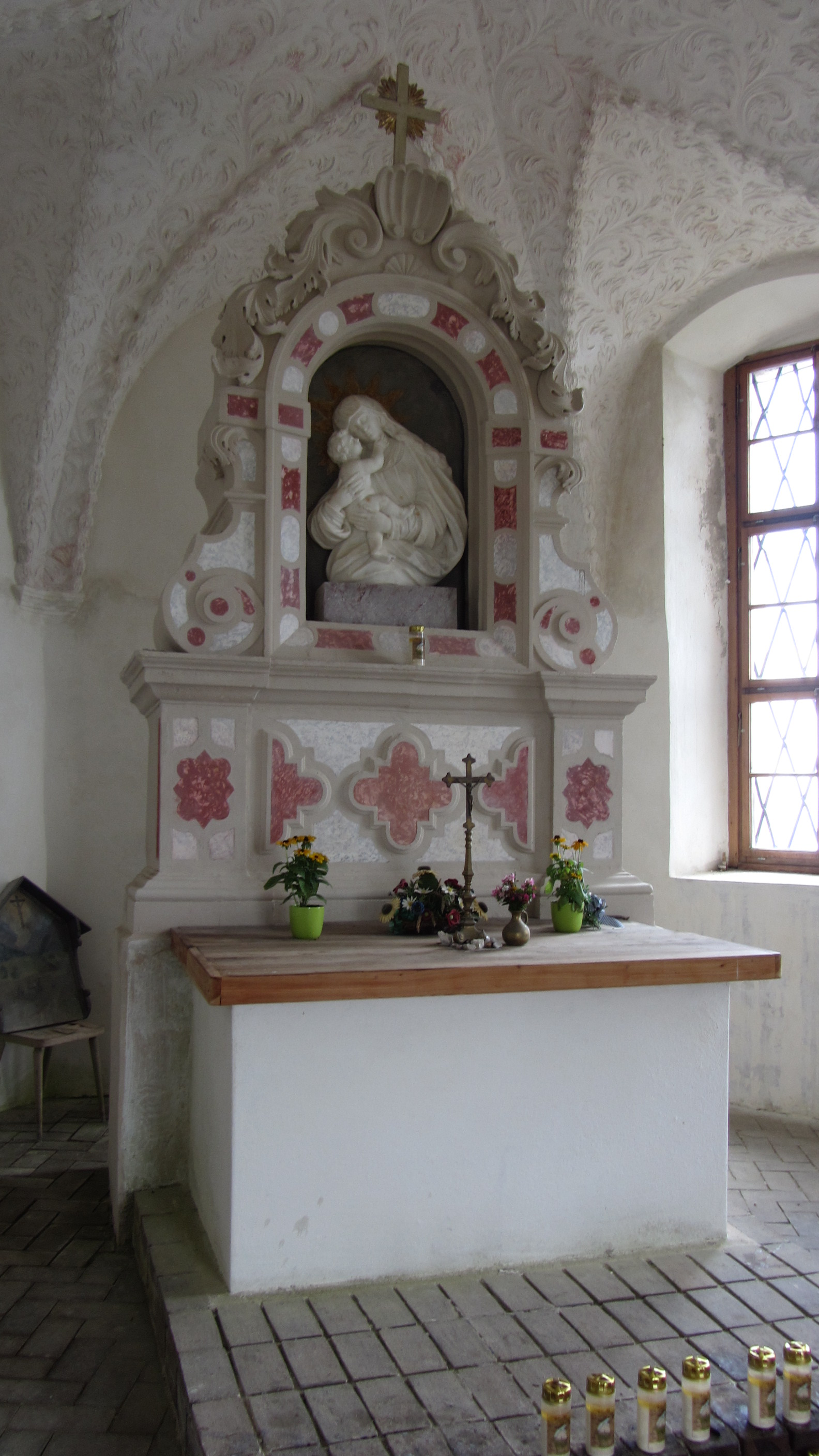 Das Bild zeigt den Inneraum der sogenannten Windischen Kapelle auf dem Dobratsch (Kärnten, Österreich)